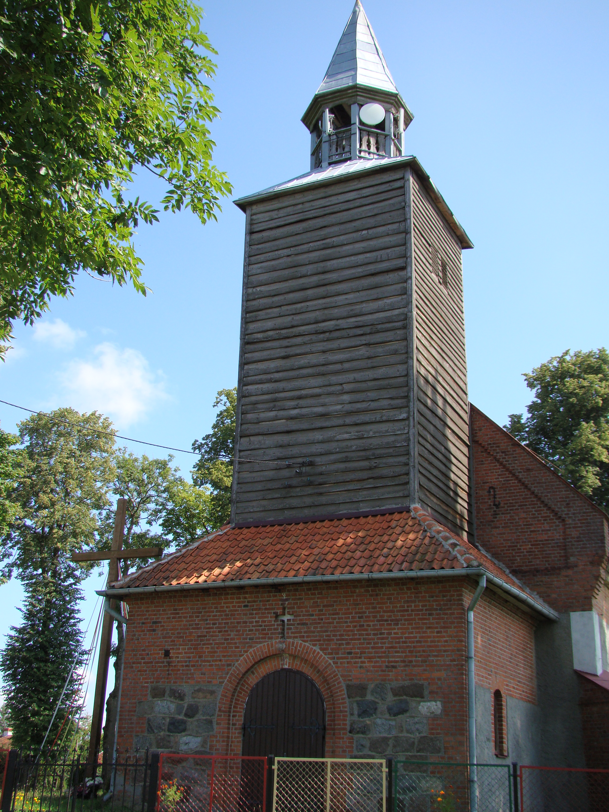 Janikowo - rzymskokatolicki kościół filialny (decyzja kaplica) p.w. Matki Boskiej Różańcowej, kon. XVI, XIX